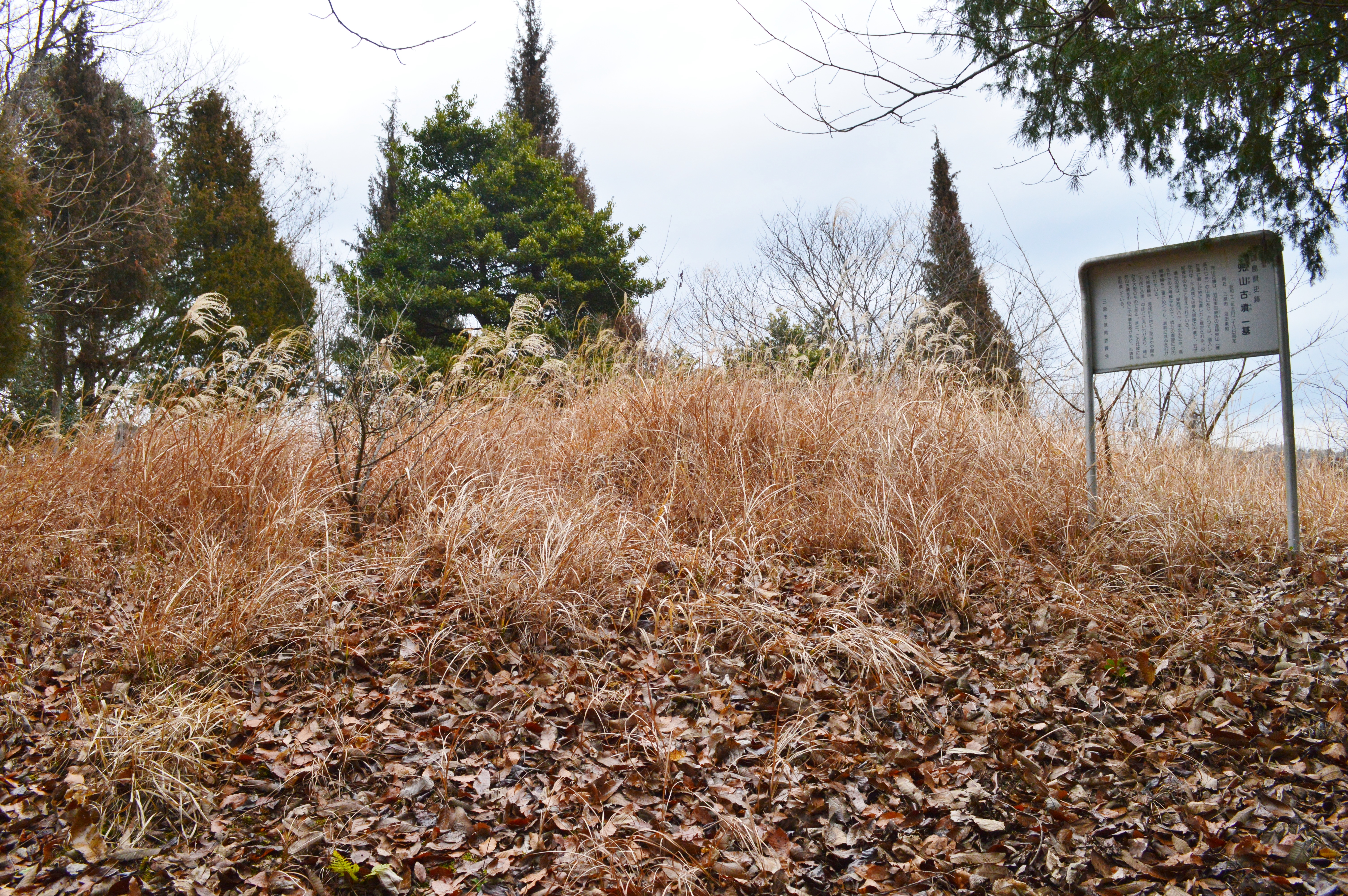 兜山古墳 (三原市) 墳頂 Nikon D3200